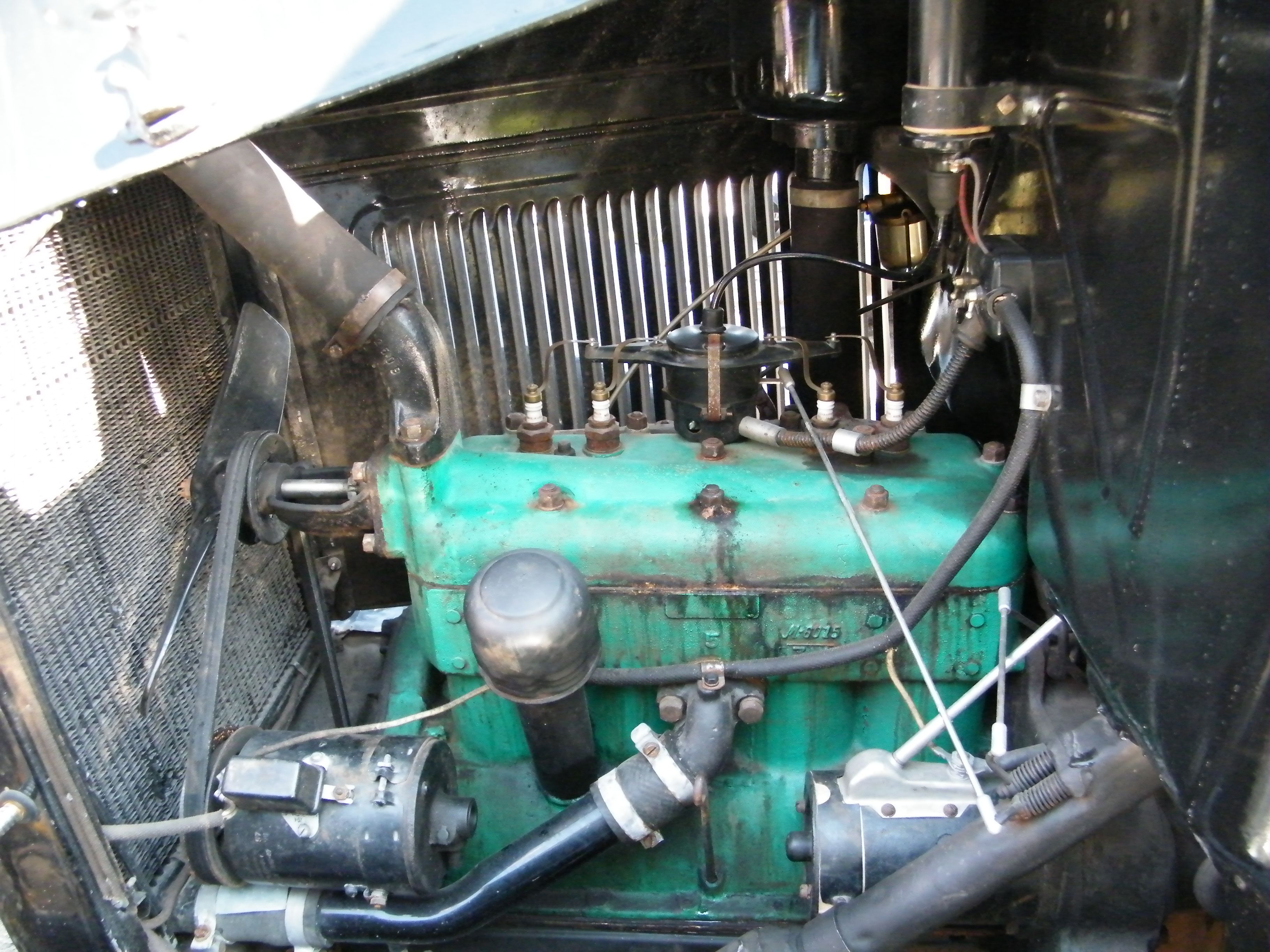 Двигатель ГАЗ-АА